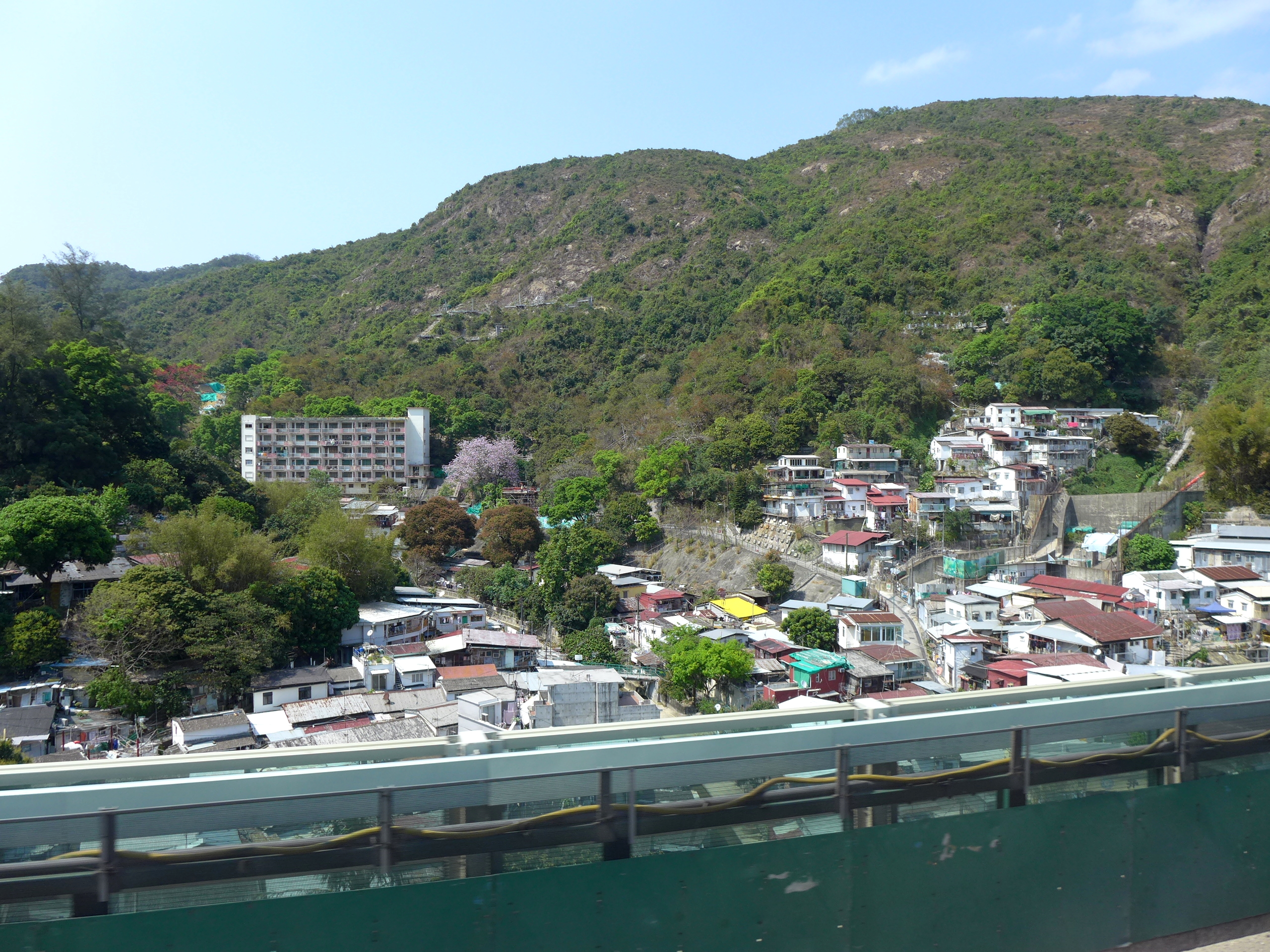 Sham Tseng San Tsuen